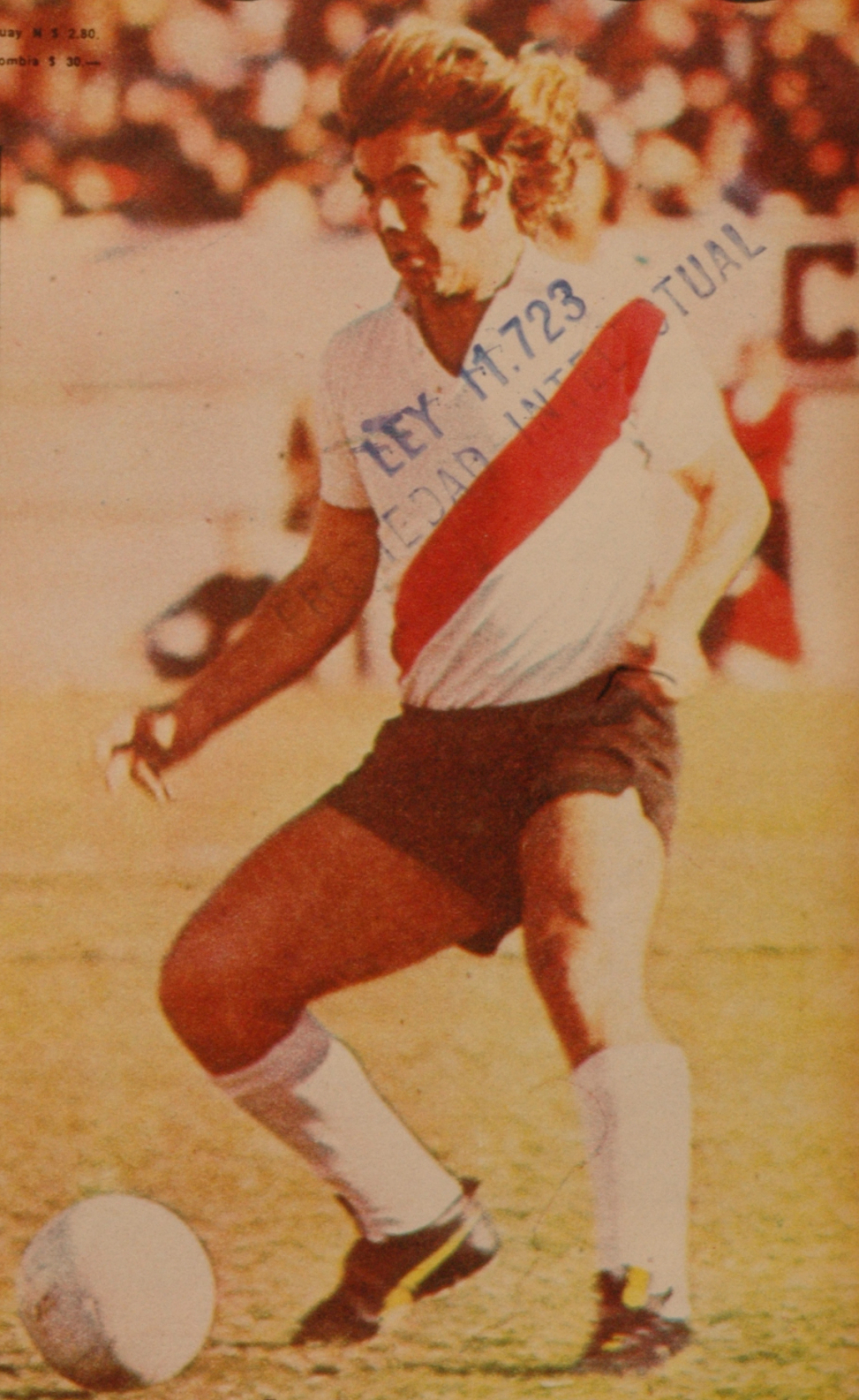 El Grafico del 23 de Noviembre de 1976. Edicion 2981